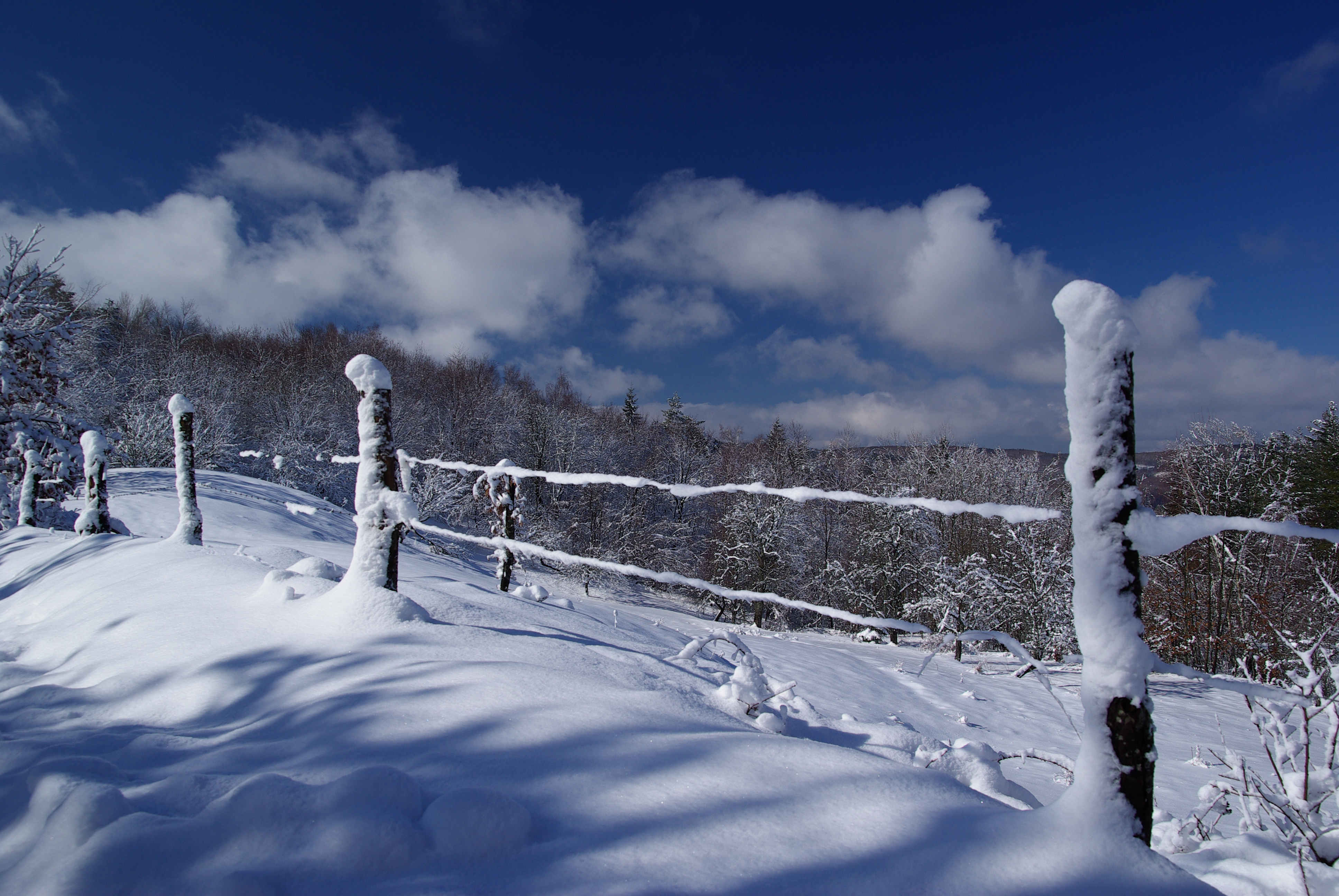 Tatre